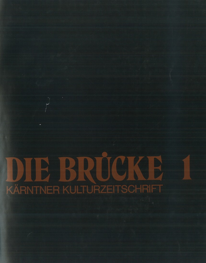 Das Cover der ersten BRÜCKE-Ausgabe im Jahr 1975.